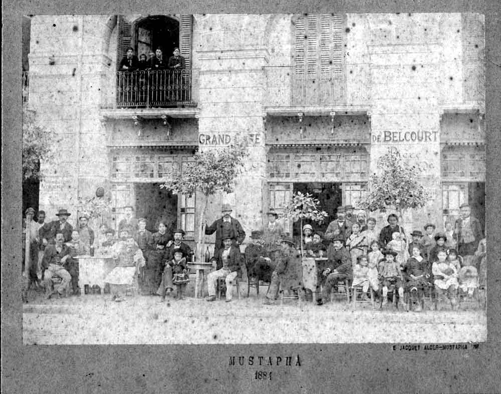 Le Grand Café de Belcourt à Mustapha (Algérie).